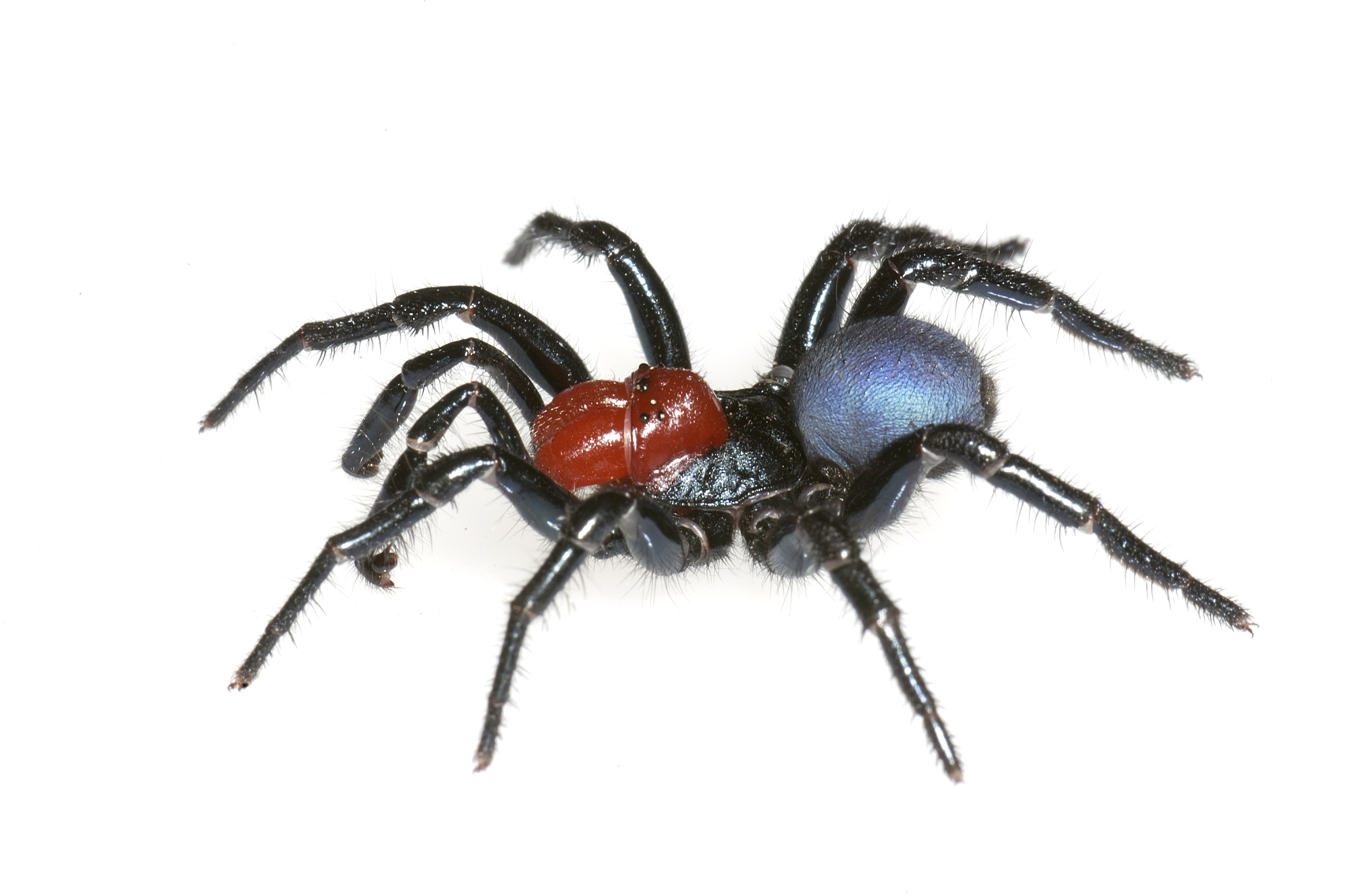 Missulena occatoria (male)